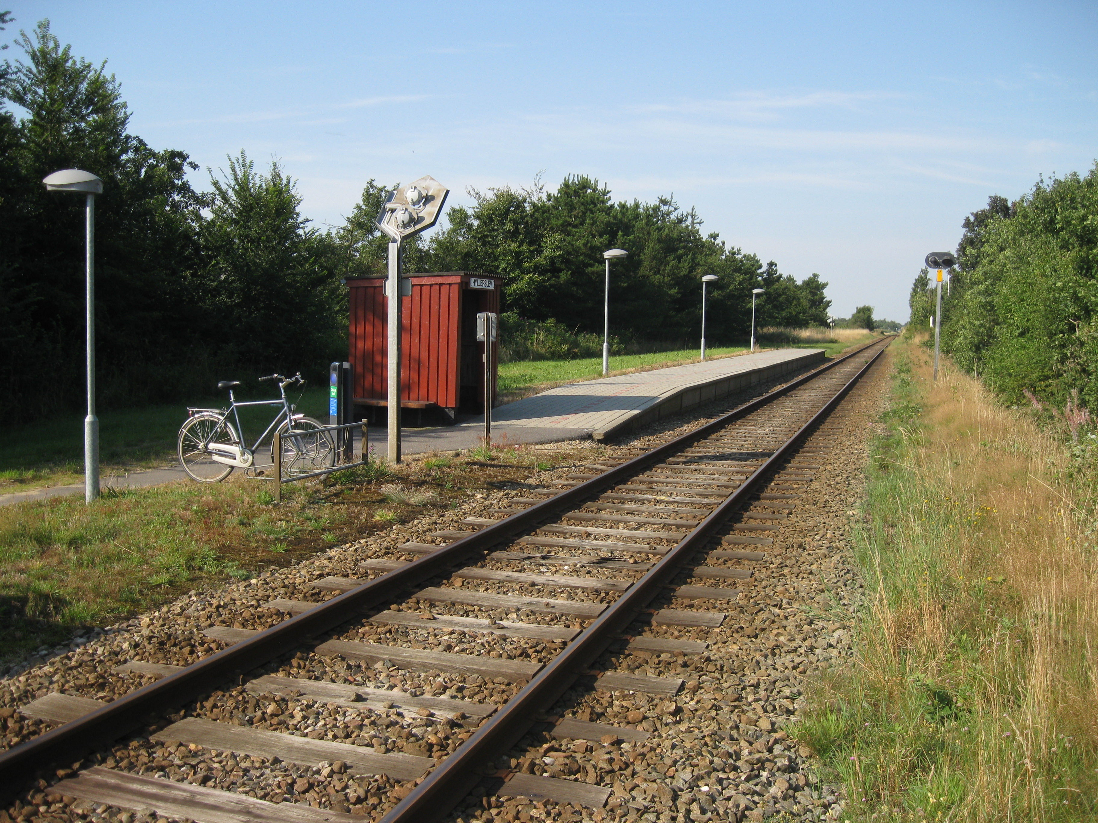 Hyllerslev Station på Vestbanen